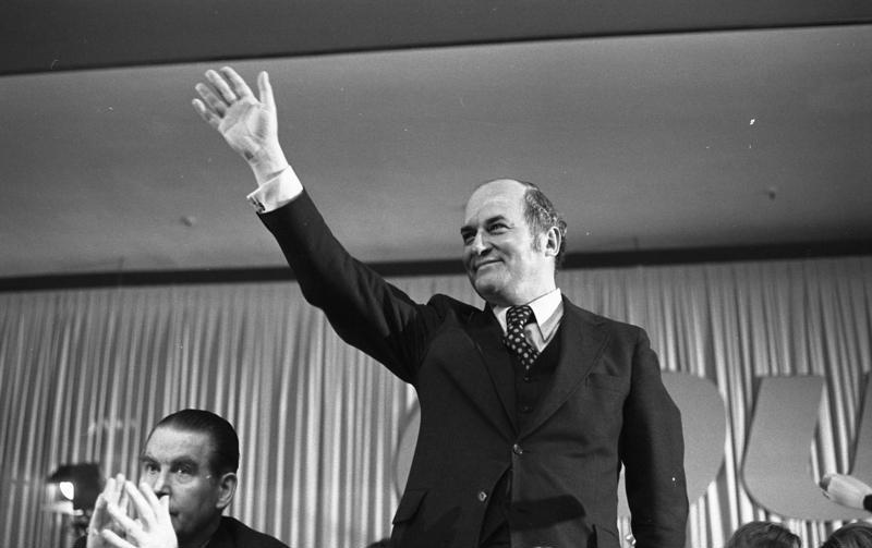 Großkundgebung der CDU zur Bundestagswahl in Köln, Messehalle (Rainer Barzel (Siegerpose))